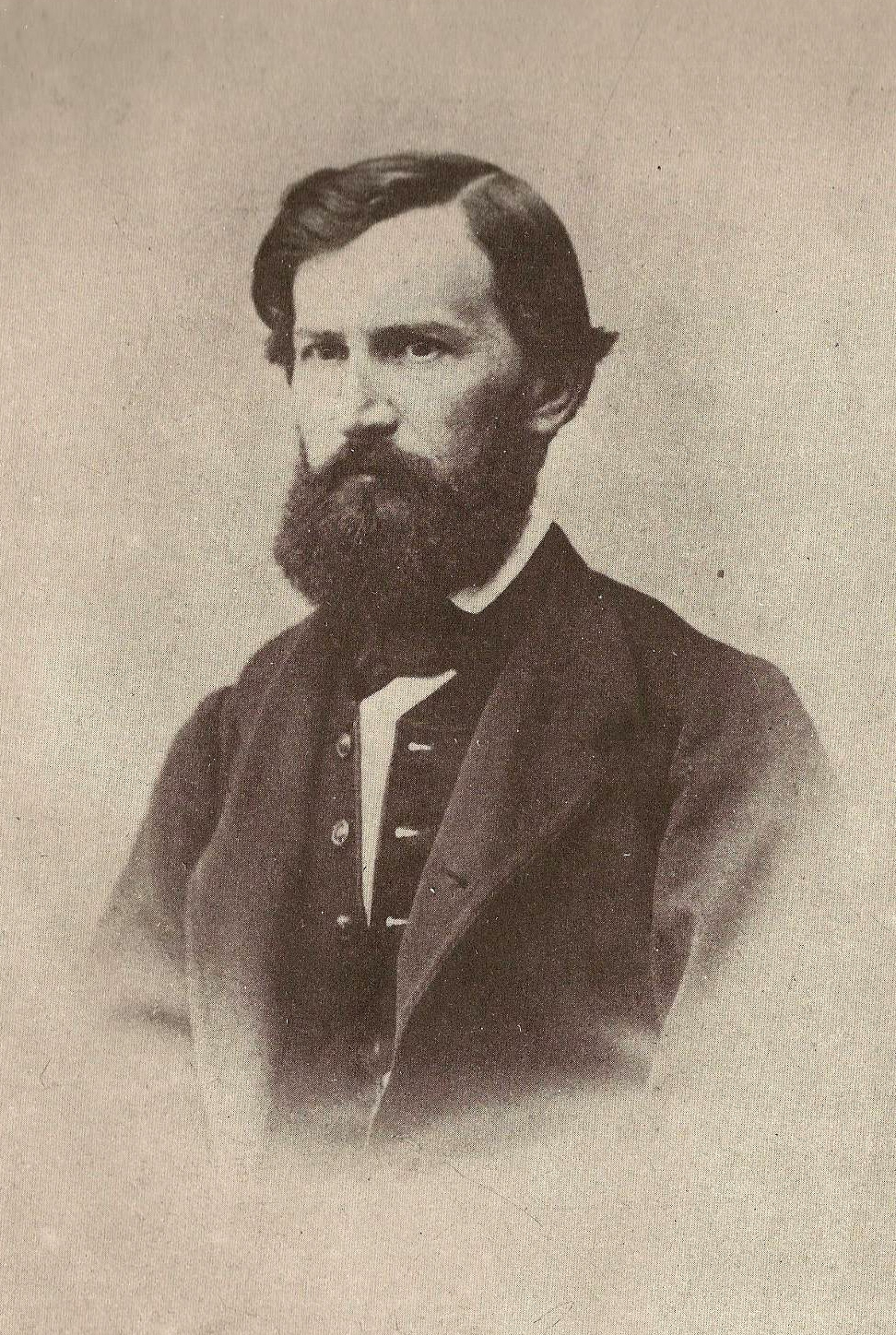 Портрет Константина Дмитриевича Ушинского